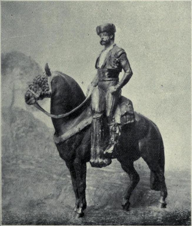 José Osorio y Silva-Bazán, duque de Alburquerque y Sesto, marqués de Alcañices, montando en el Soto de Mozanaque (Algete) en 1874. Luce traje nacional de faena de campo.